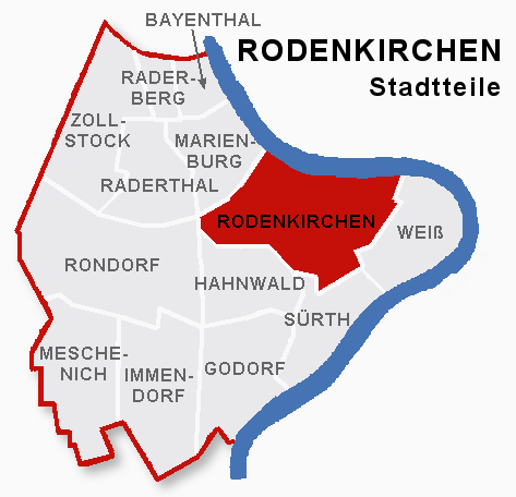 Lage des Stadtteils Rodenkirchen im Stadtbezik Rodenkirchen